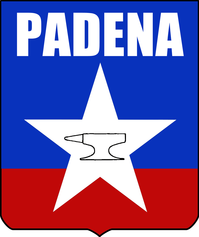 Reproduction of the emblem used by PADENA party.